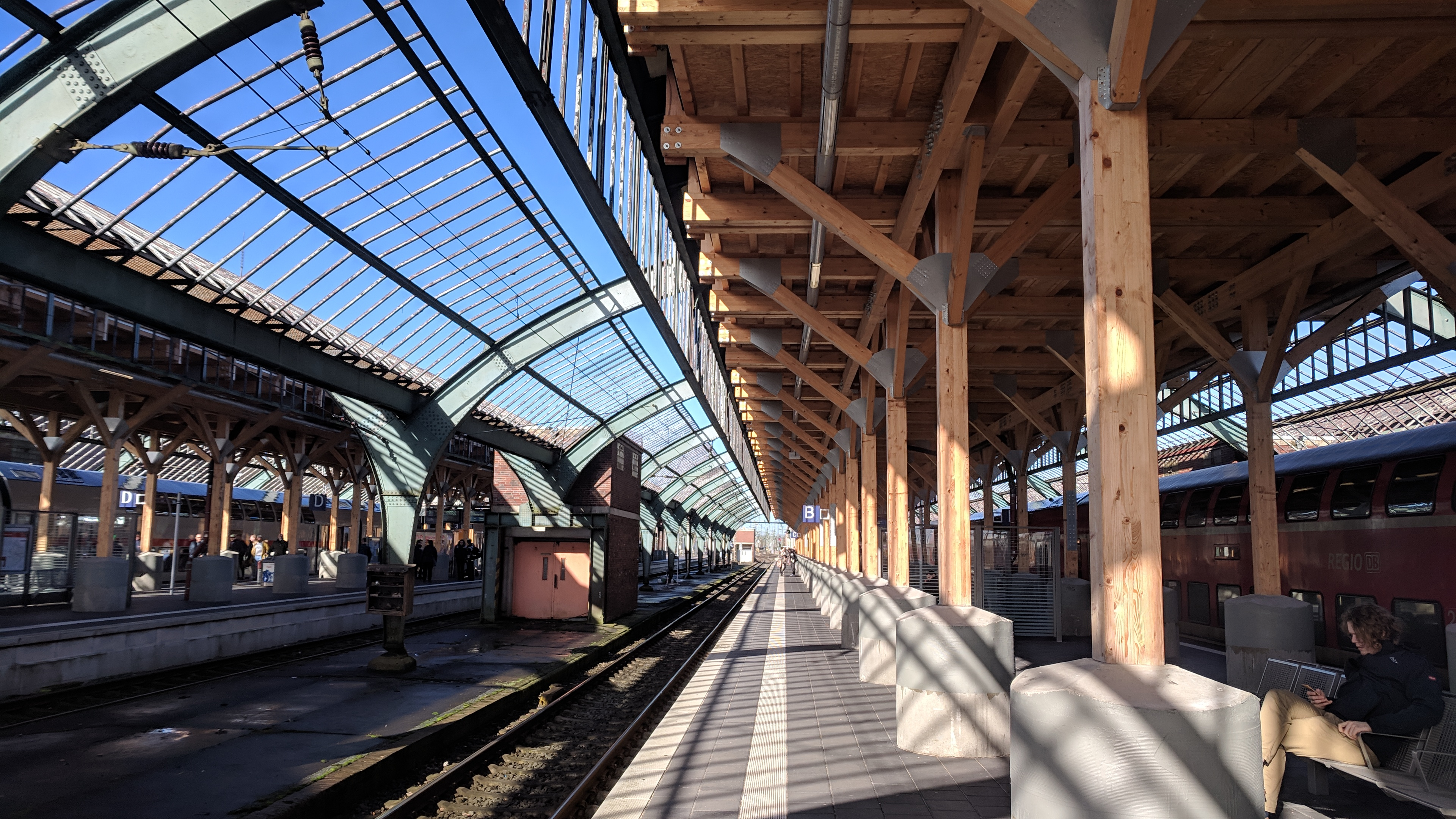 Bahnhof Oldenburg (Oldenburg) Hauptbahnhof, Holzgerüst für die Sanierungsarbeiten am Hallendach. Die massiven Holzkonstruktionen bieten auf den Bahnsteigen Schutz vor Regen und herabfallenden Teilen. Taken on 19 March 2019